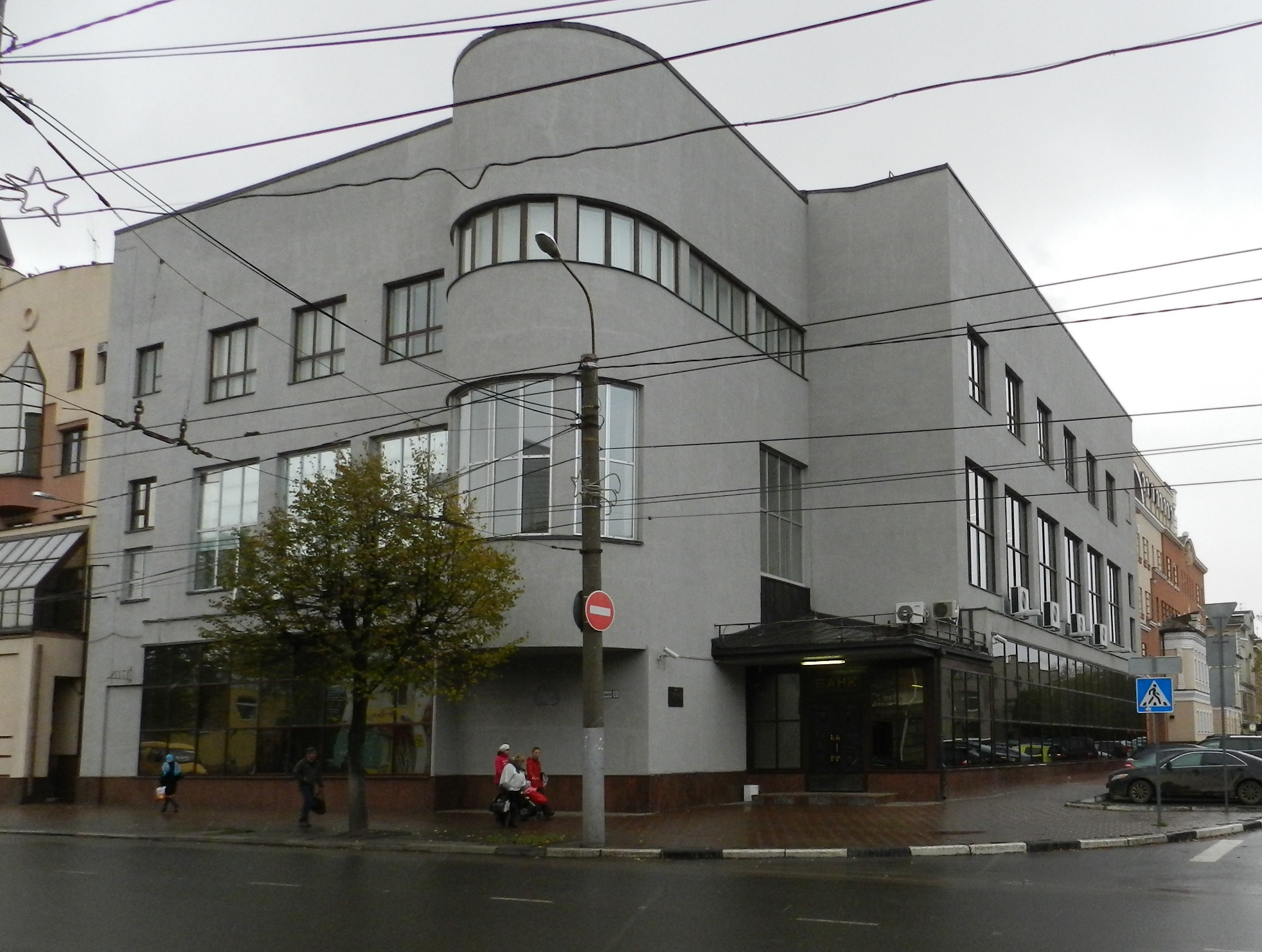 Банк Соединенный (Ивановская область, Иваново, Красной Армии улица, 11)